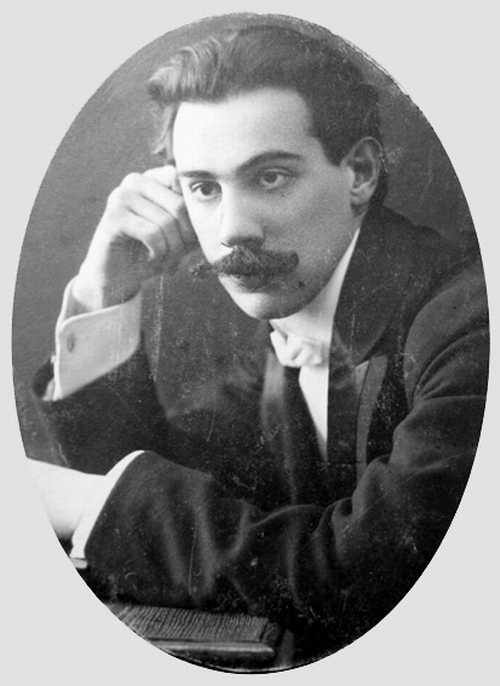 Alexander Belayev